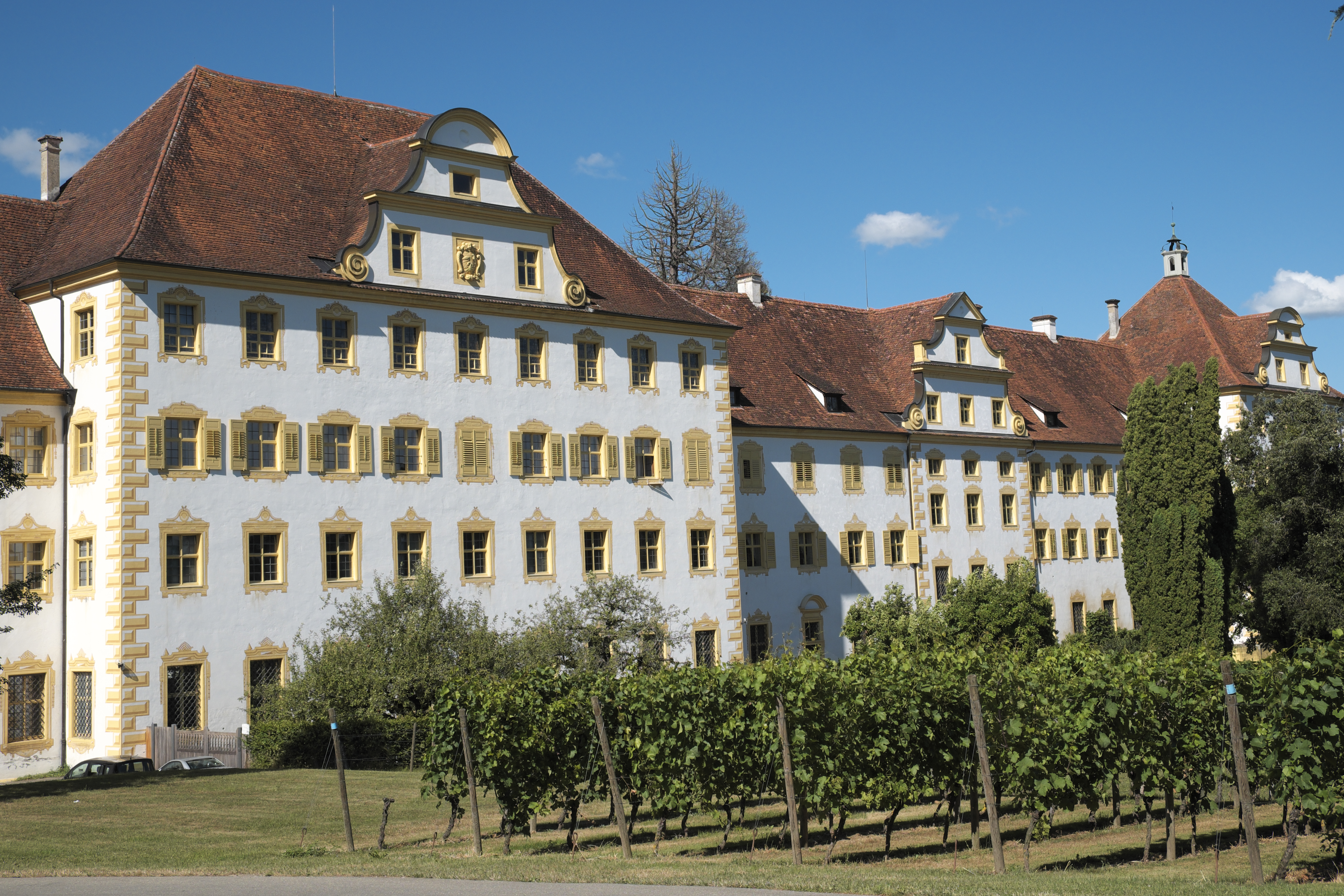 Ehemalige Reichsabtei Salem in Salem (Baden) im Bodenseekreis (Baden-Württemberg/Deutschland)